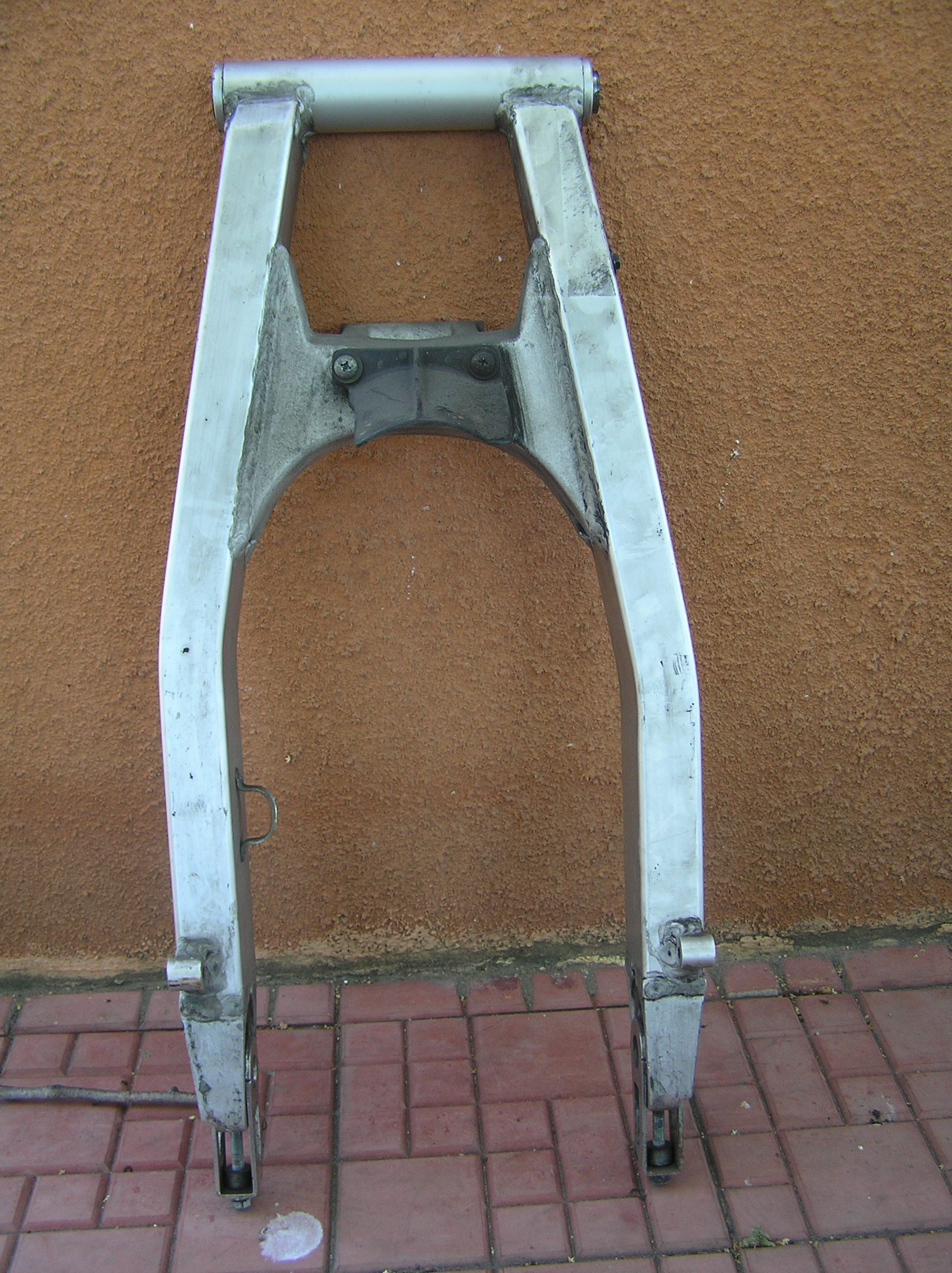 swingarm Wahacz